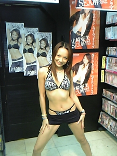 山崎亜美イベント写真１